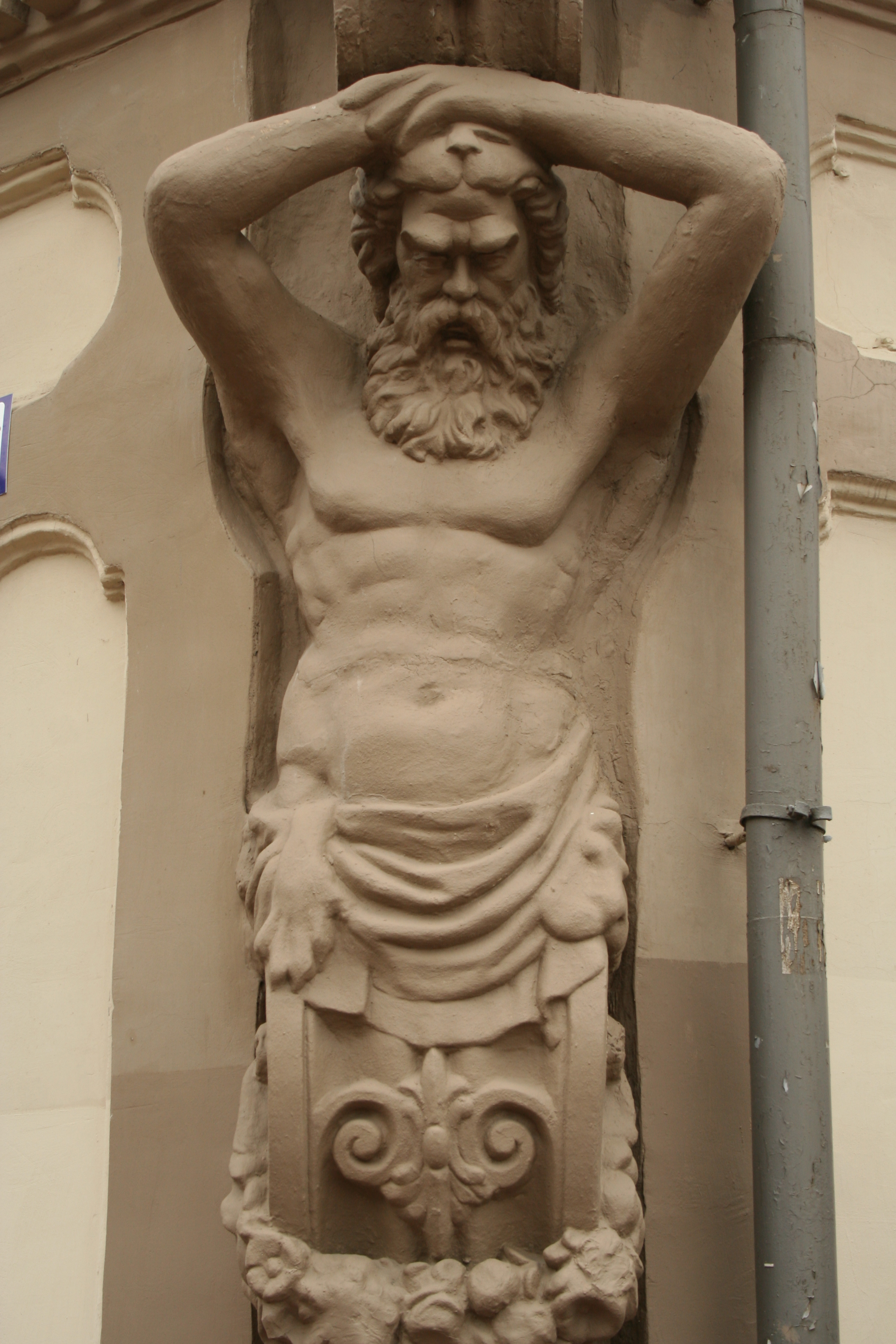 Доходный дом Пальцевых (Нижегородская область, Нижний Новгород, Большая Покровская улица, 21)